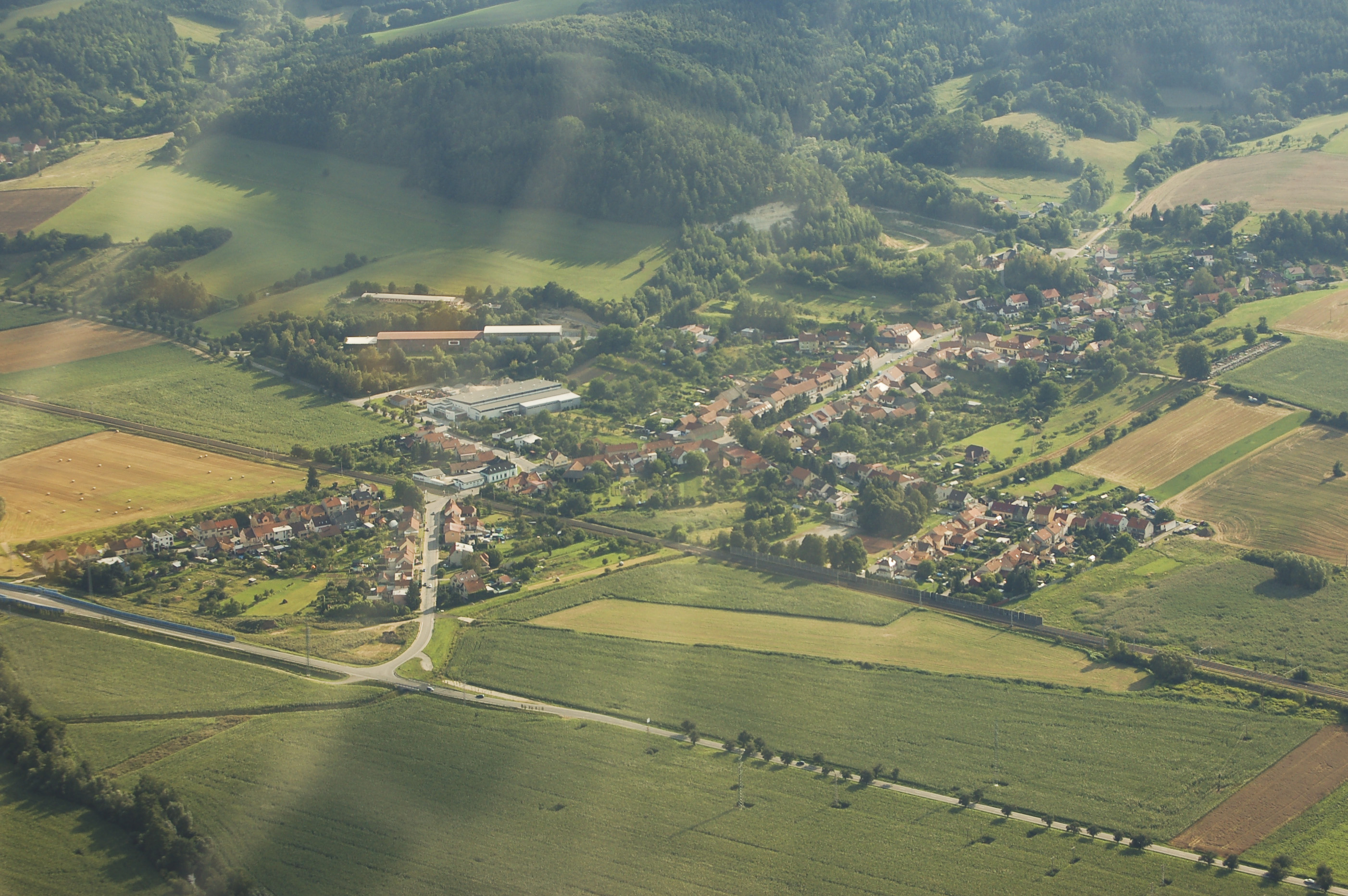 Letecký snímek obce Spešov u Blanska